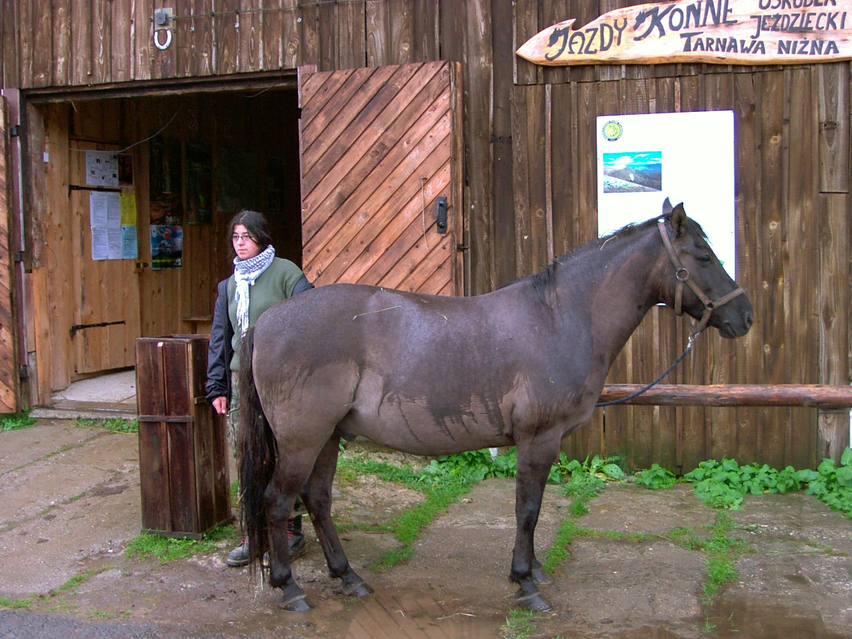 Hutsulenpferd im Gestüt Jazdy Konne oberen Tal des San. Mit Gestütsleiterin Magdalena Sowala.